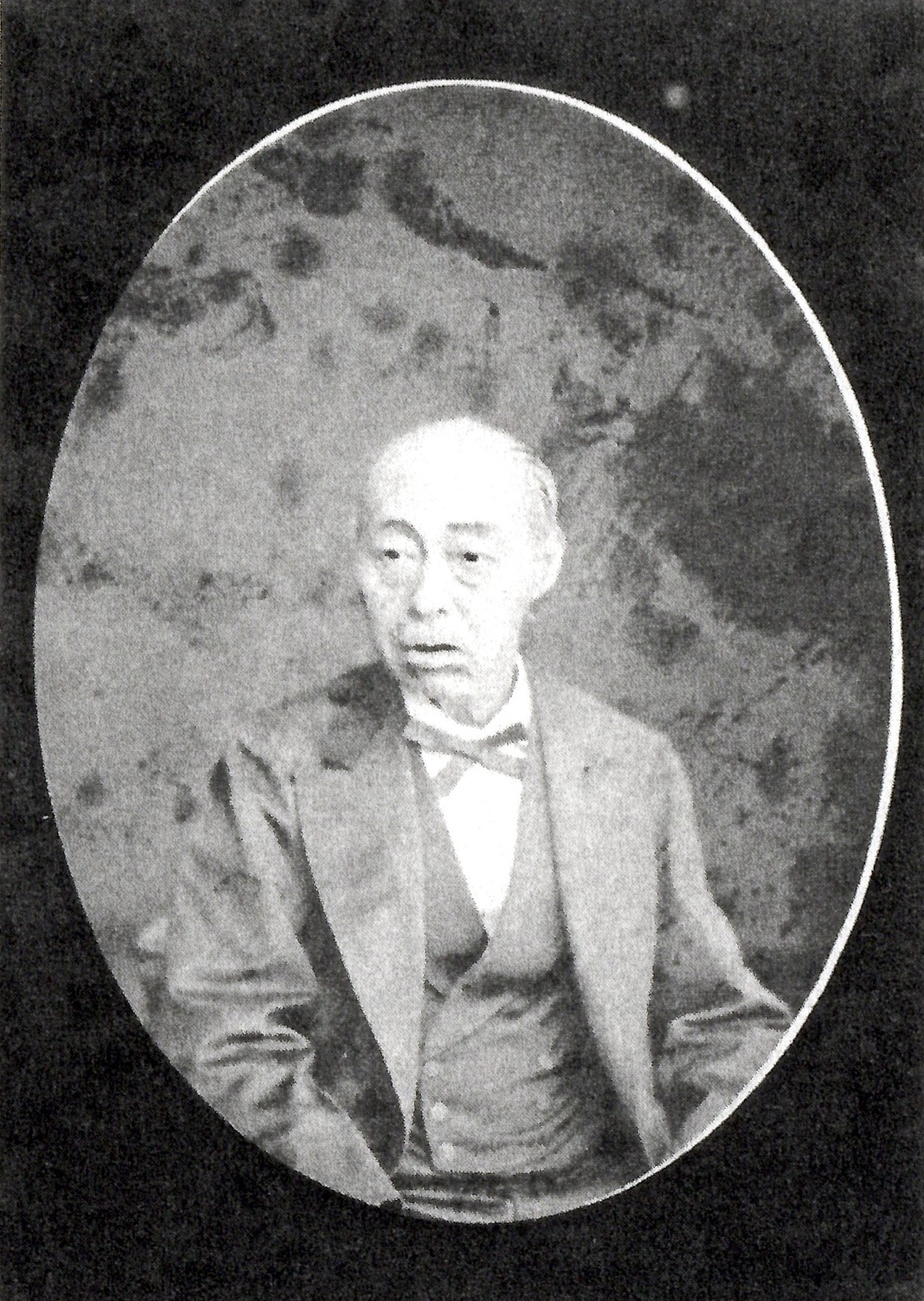 仙石久利の肖像写真。